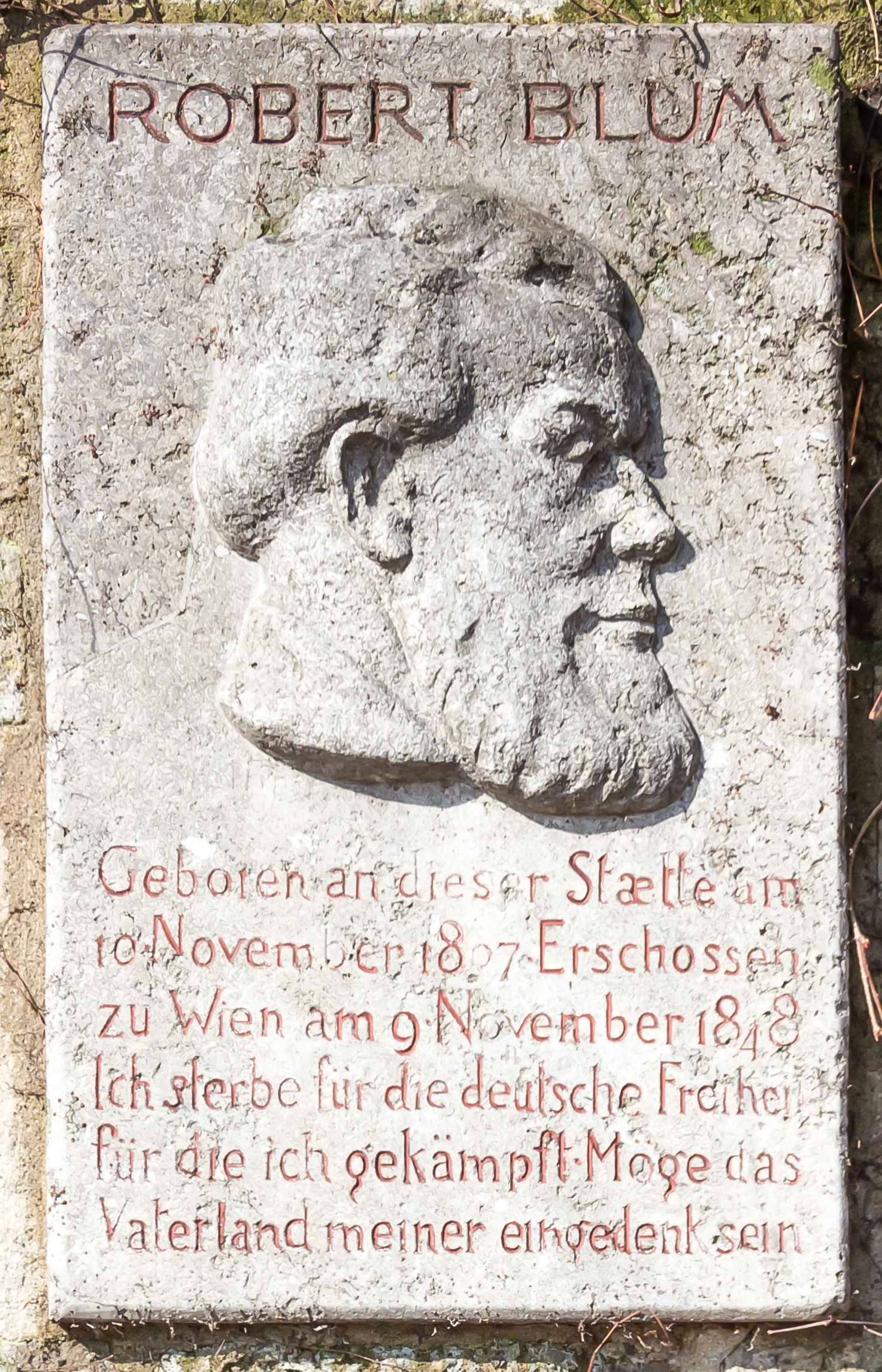 Gedenktafel für Robert Blum (deutscher Politiker, Publizist, Verleger und Dichter)